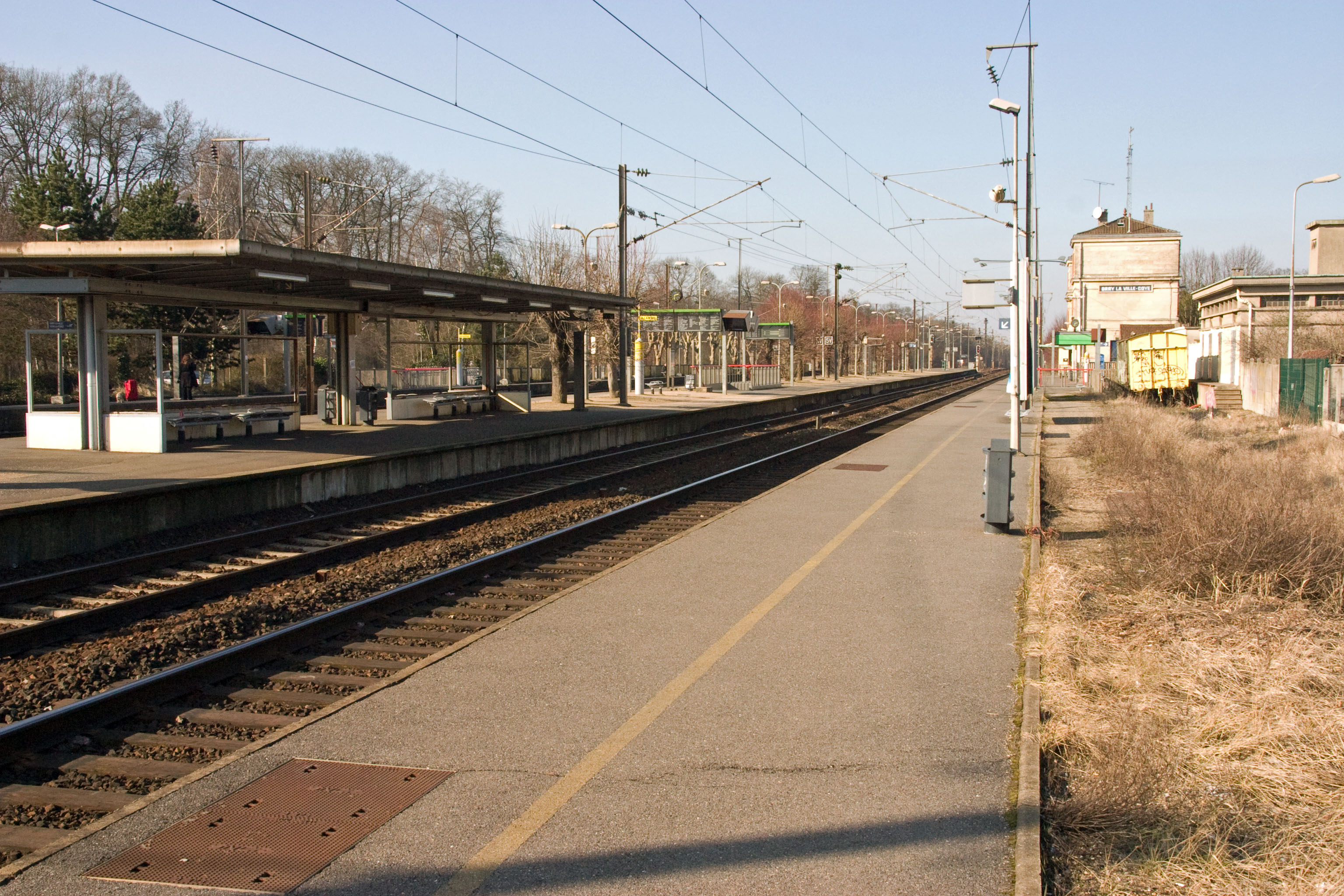 Gare d'Orry-la-Ville - Coye, Orry-la-Ville, département de l'Oise (France)